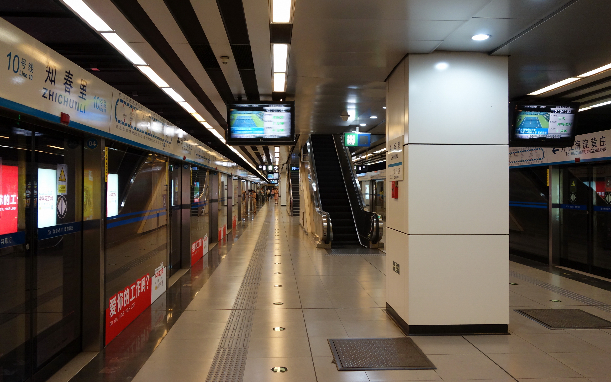 北京地铁10号线知春里站站台，线路图显示是10号线全线开通之后。